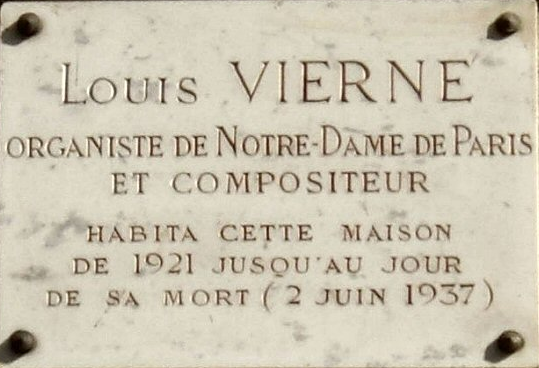 Plaque au 37 rue Saint-Ferdinand